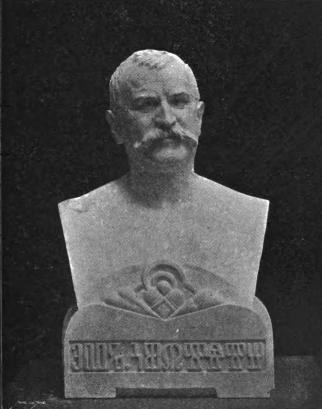 Eugen Kumičić (Evgenij Kumičić; 1850–1904), Croatian teacher, writer and politician